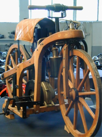 Reitwagen Nachbau von 1885